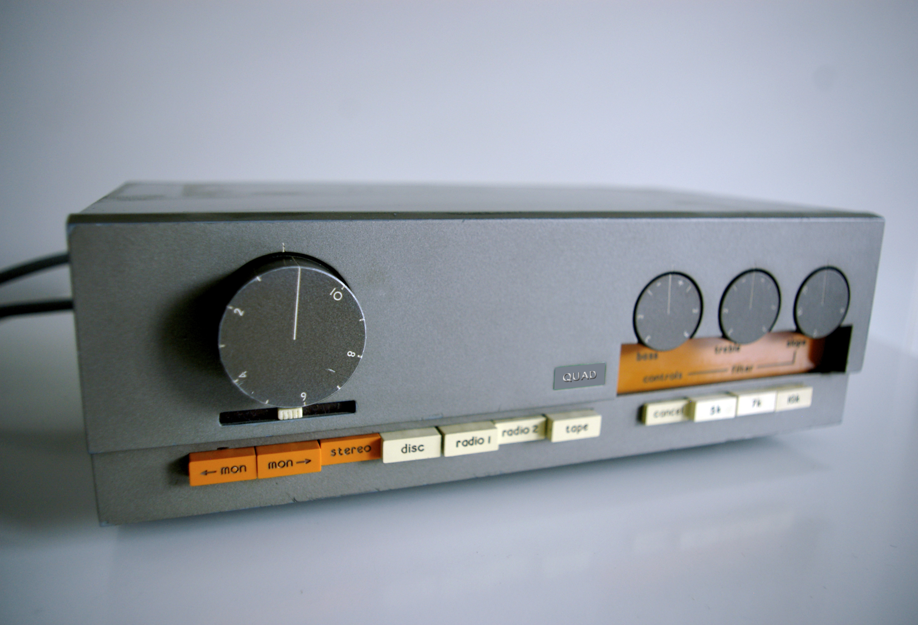 Vorstufe Quad 33, Frontansicht, Autor: Greatarti